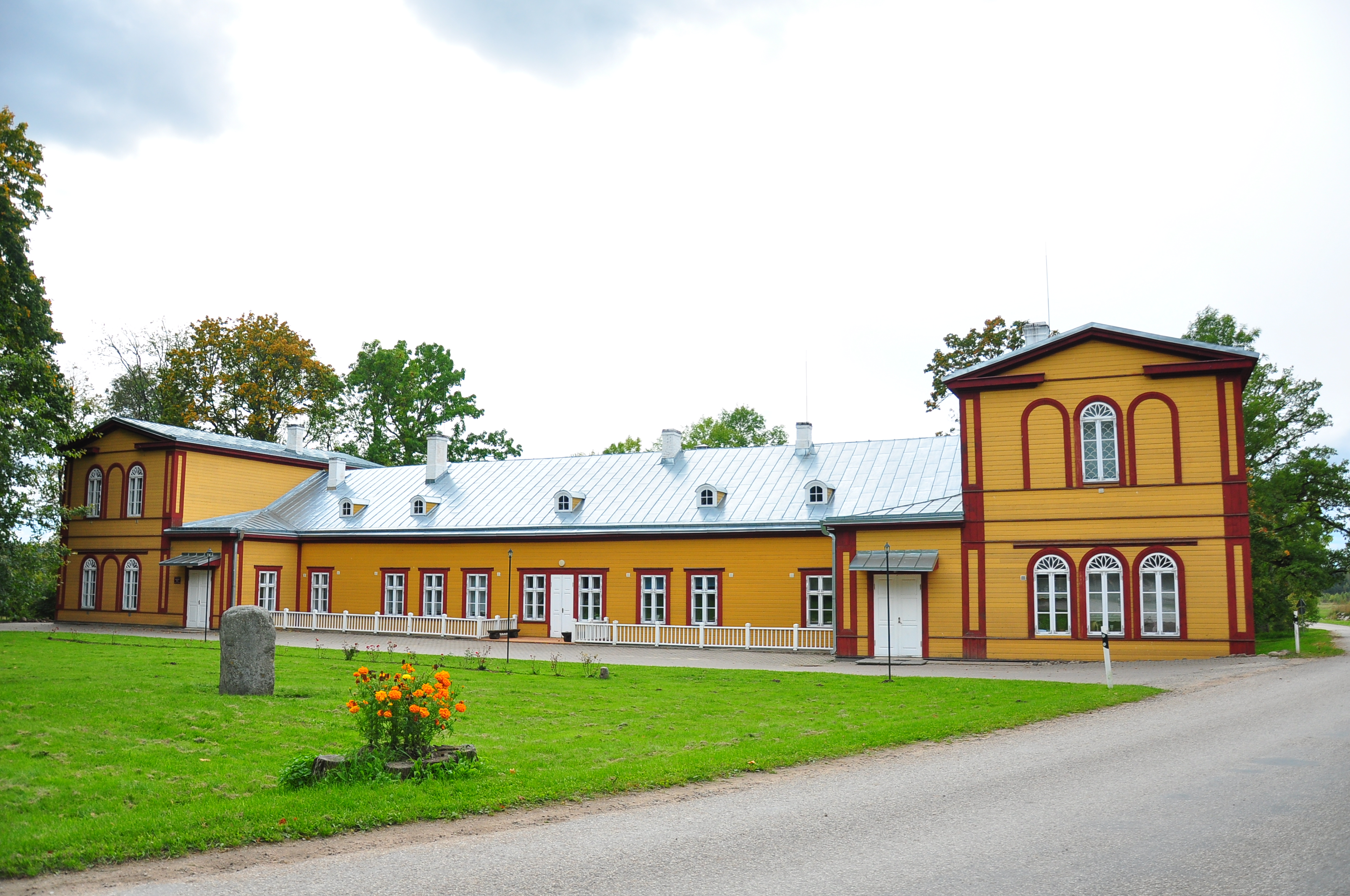 Palupera mõisa peahoone